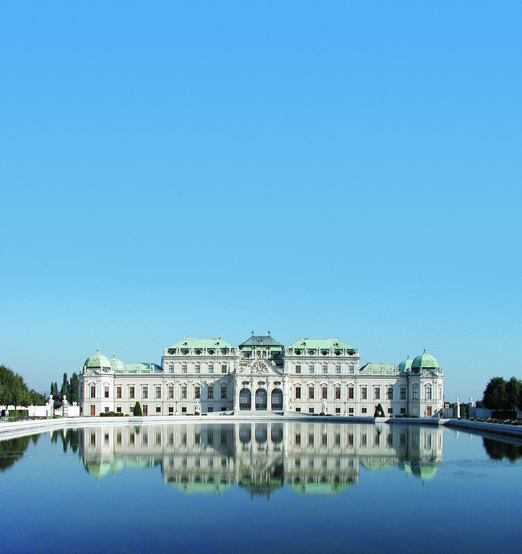 Blick auf die Nordseite des Oberen Belvederes in Wien